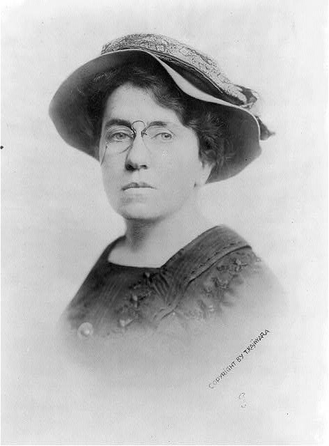 Emma Goldmann - Kongressbibliothek Fotograf: T. Kajiwara Datum: 1911 Herkunft: Kongressbibliothek der USA